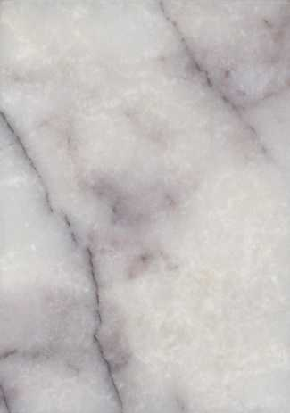 Marmor